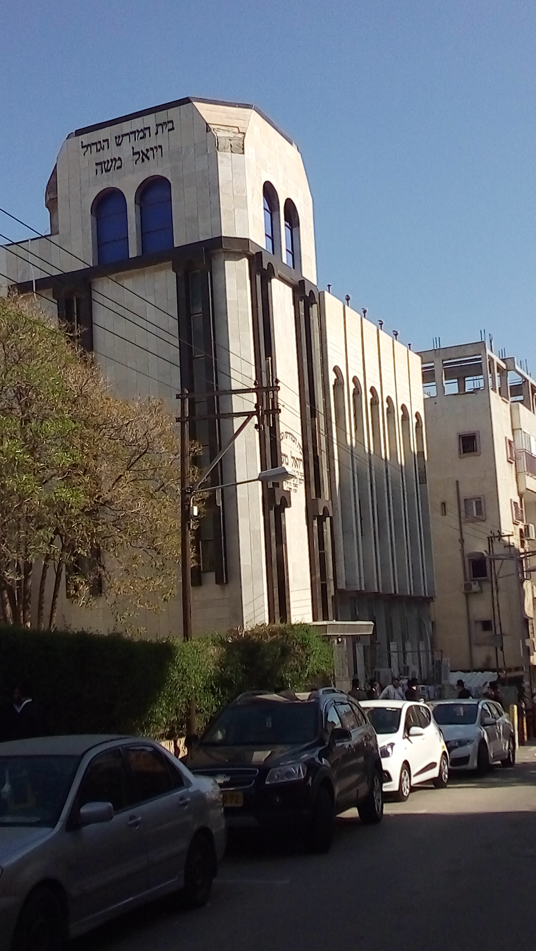 בית כנסת סאטמר בני ברק